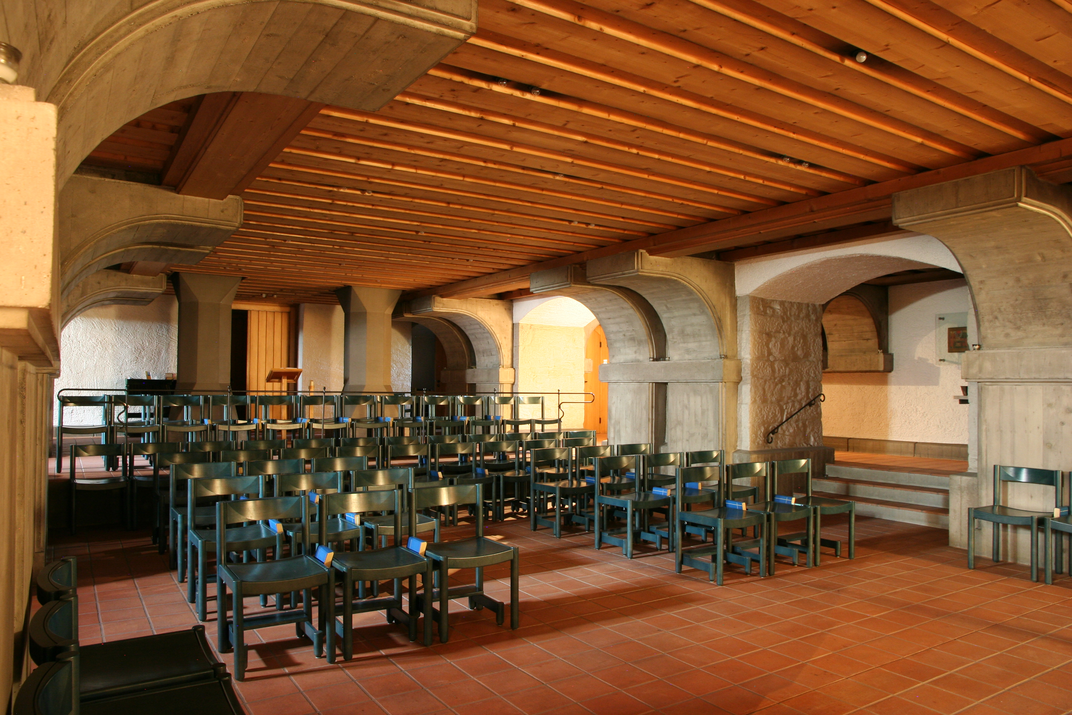 Römisch-katholische Pfarrkirche St. Georg Küsnacht ZH